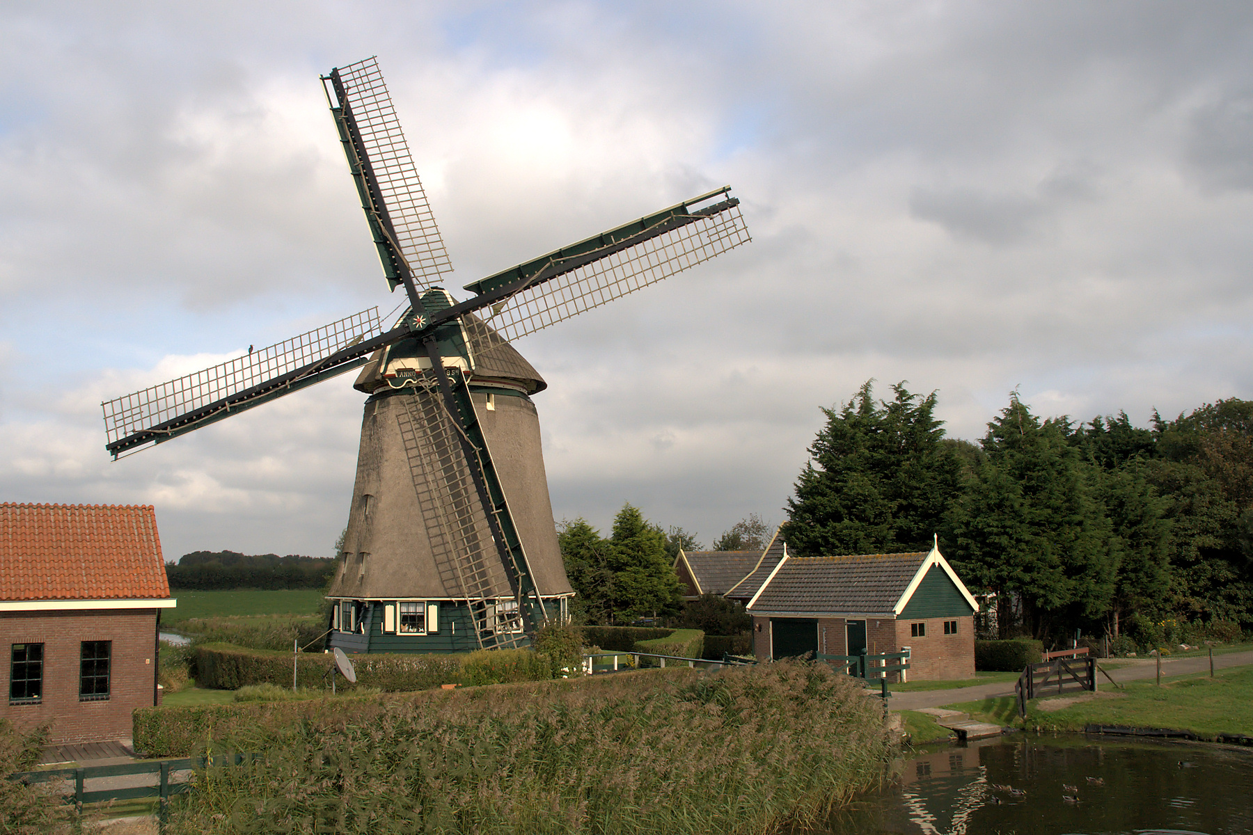 Nieuwe Niedorp - De Westermolen in rouwstand